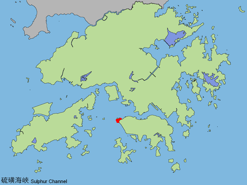 中文（香港）: 硫磺海峽。